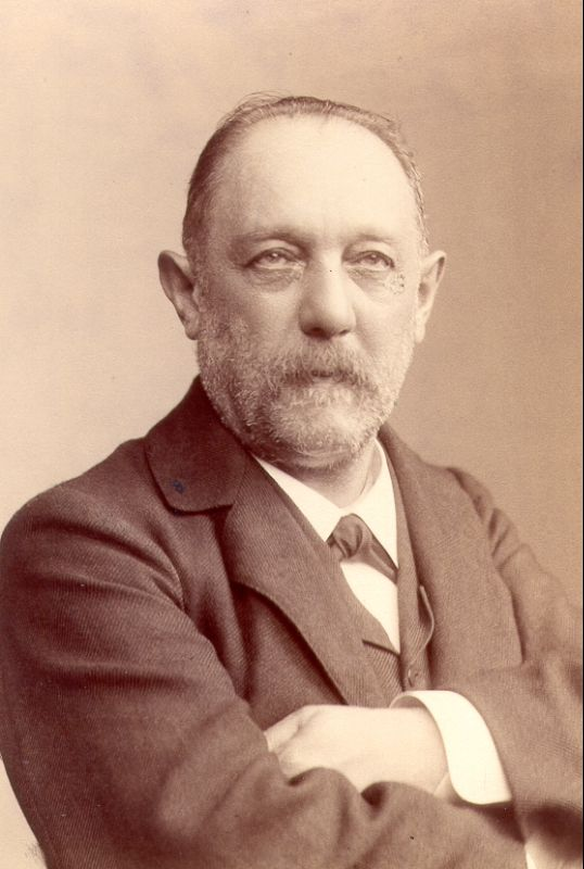 Emanuel Mendel, by J. C. Schaarwächter